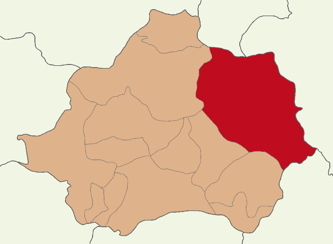 Kütahya Merkez ilçesinin konumu